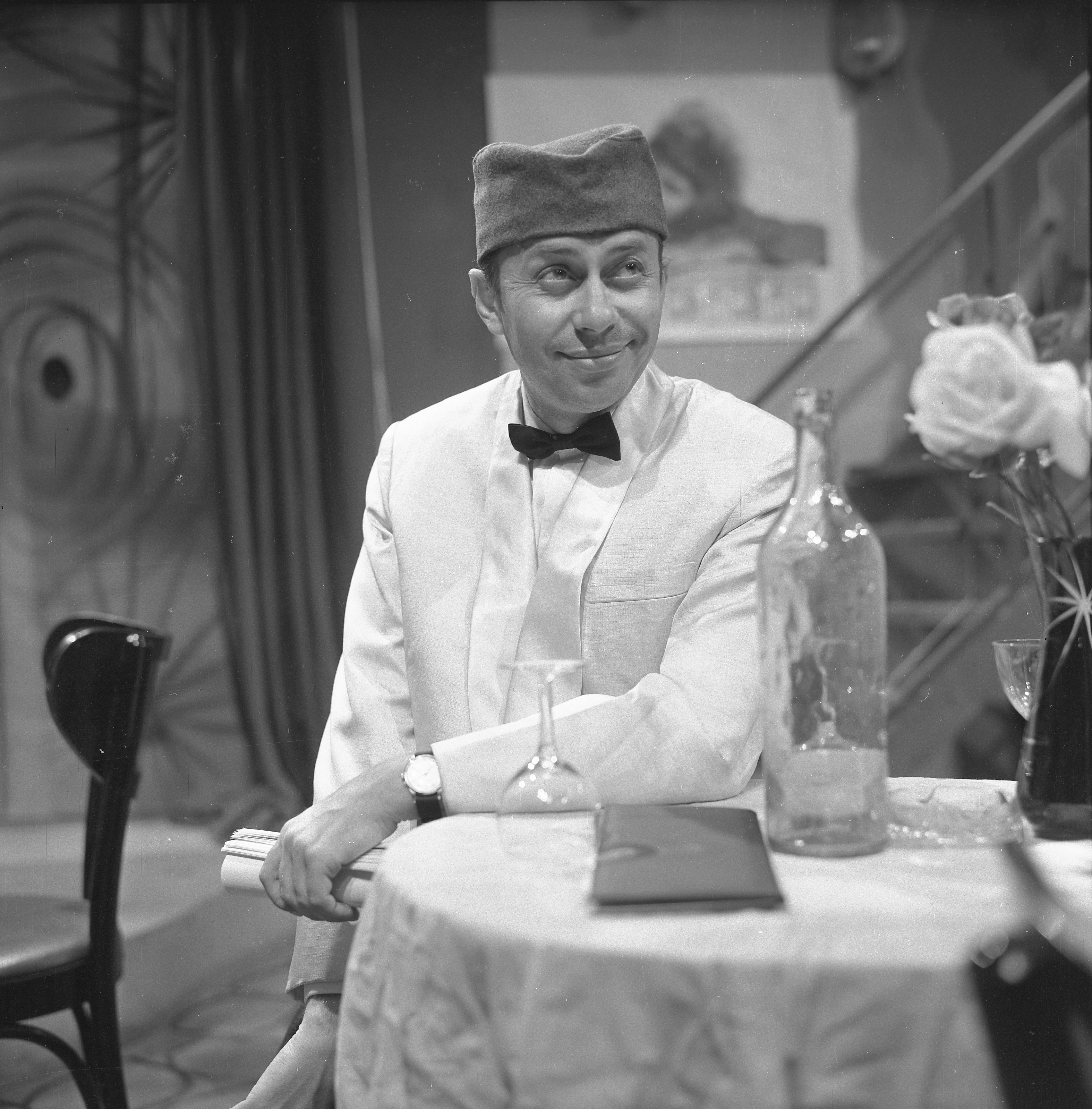 Miodrag Petrović Čkalja, (1923−2003) srpski glumac, 1963. godine. Foto:Stevan Kragujević (po odobrenju kćerke Tanje Kragujević)